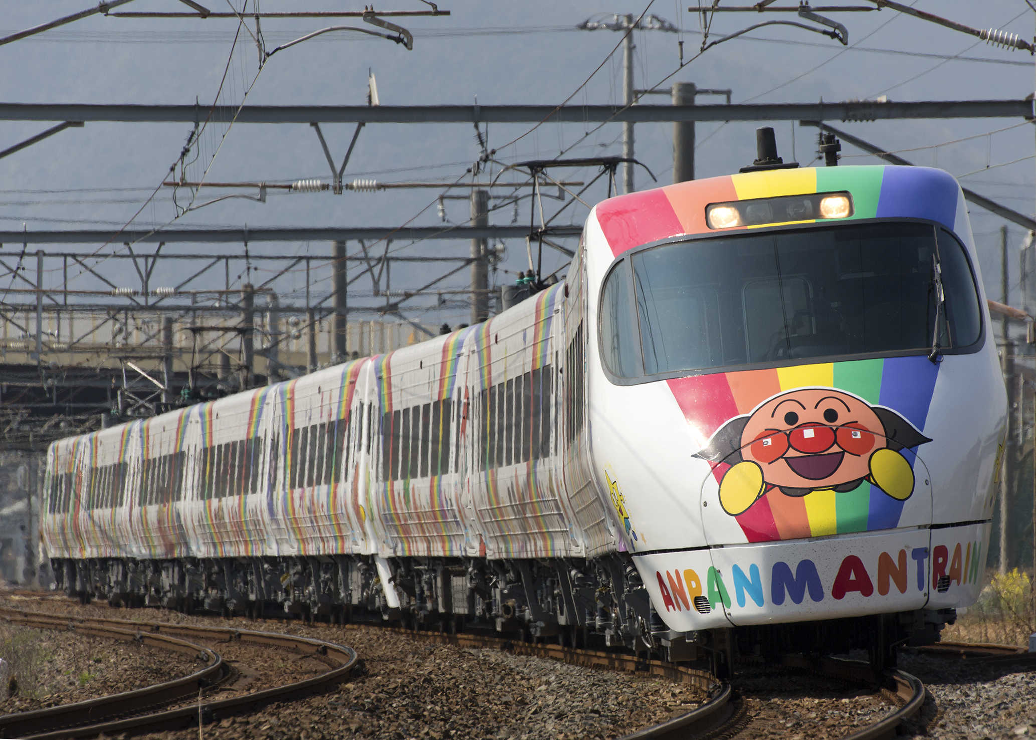 JR四国 8000系特急型電車 いしづち しおかぜ